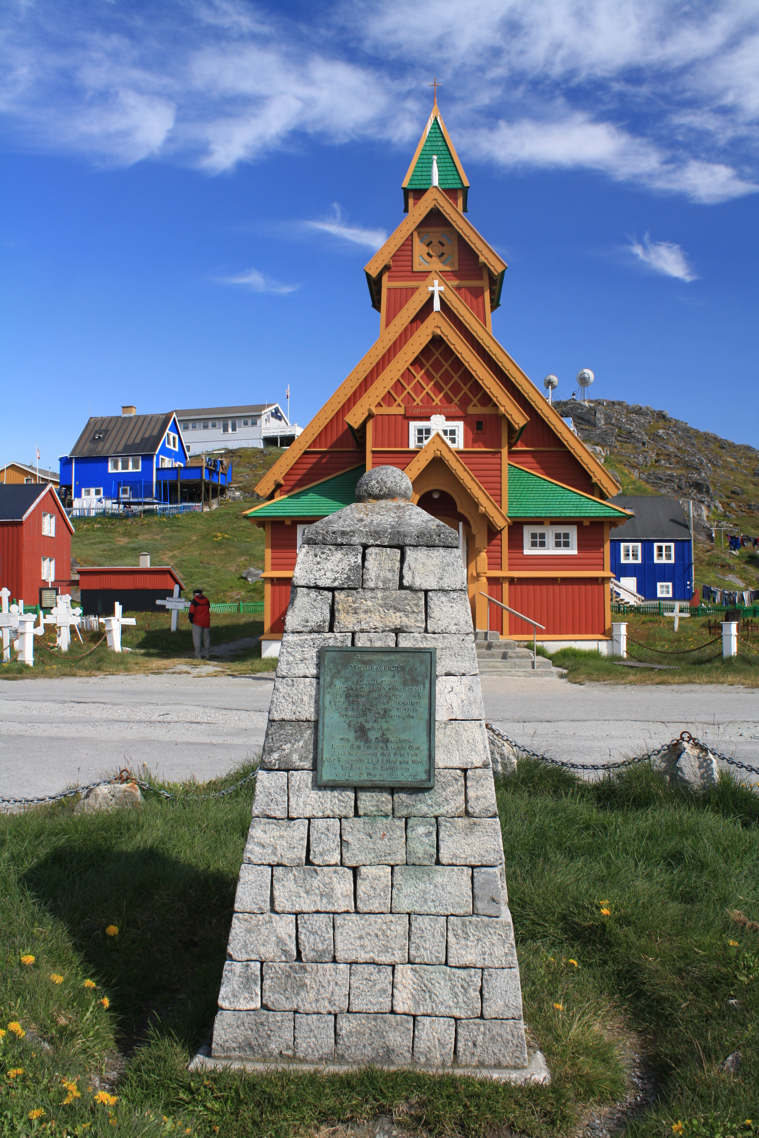 Gedenkstein für den dänischen Geistlichen Otto (Otho) Fabricius in Paamiut, Grönland.